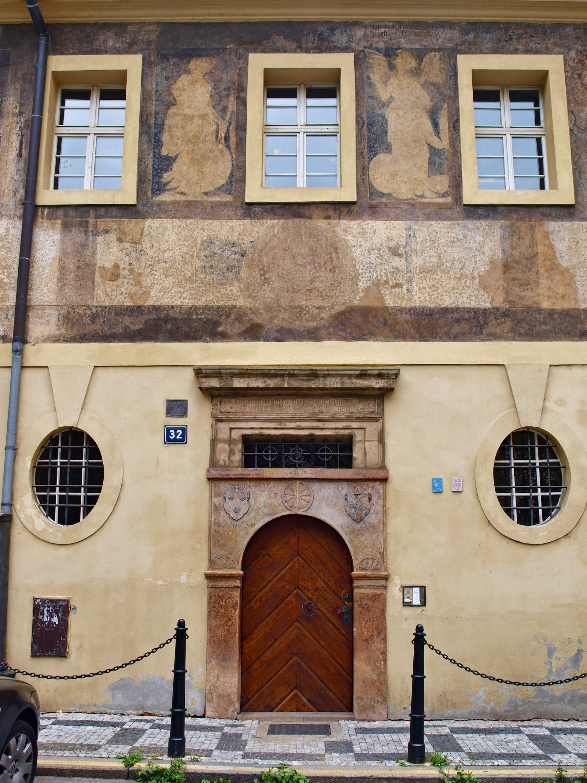 Svatojindřišská farní škola